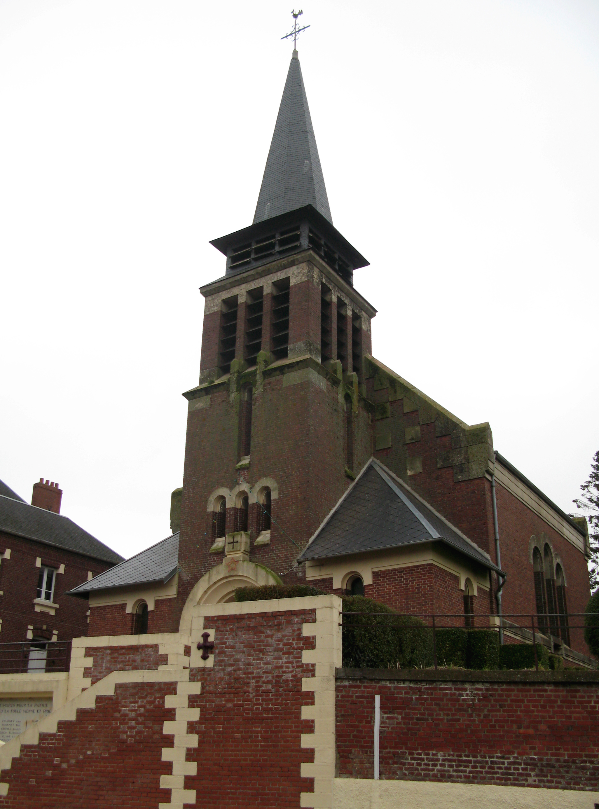 Équancourt (Somme, France) - L'église.